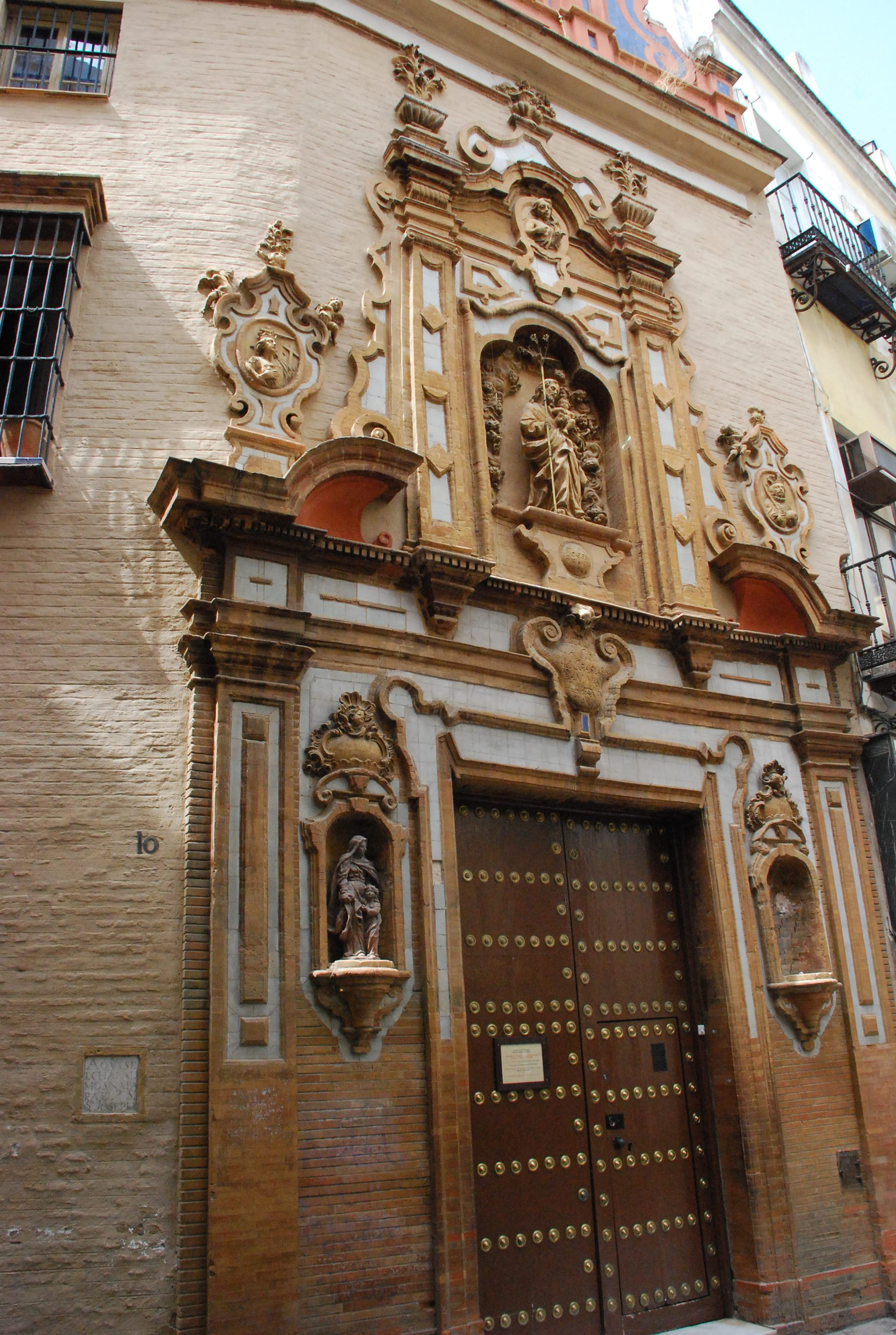 Portada de la capilla de San José en Sevilla (España)